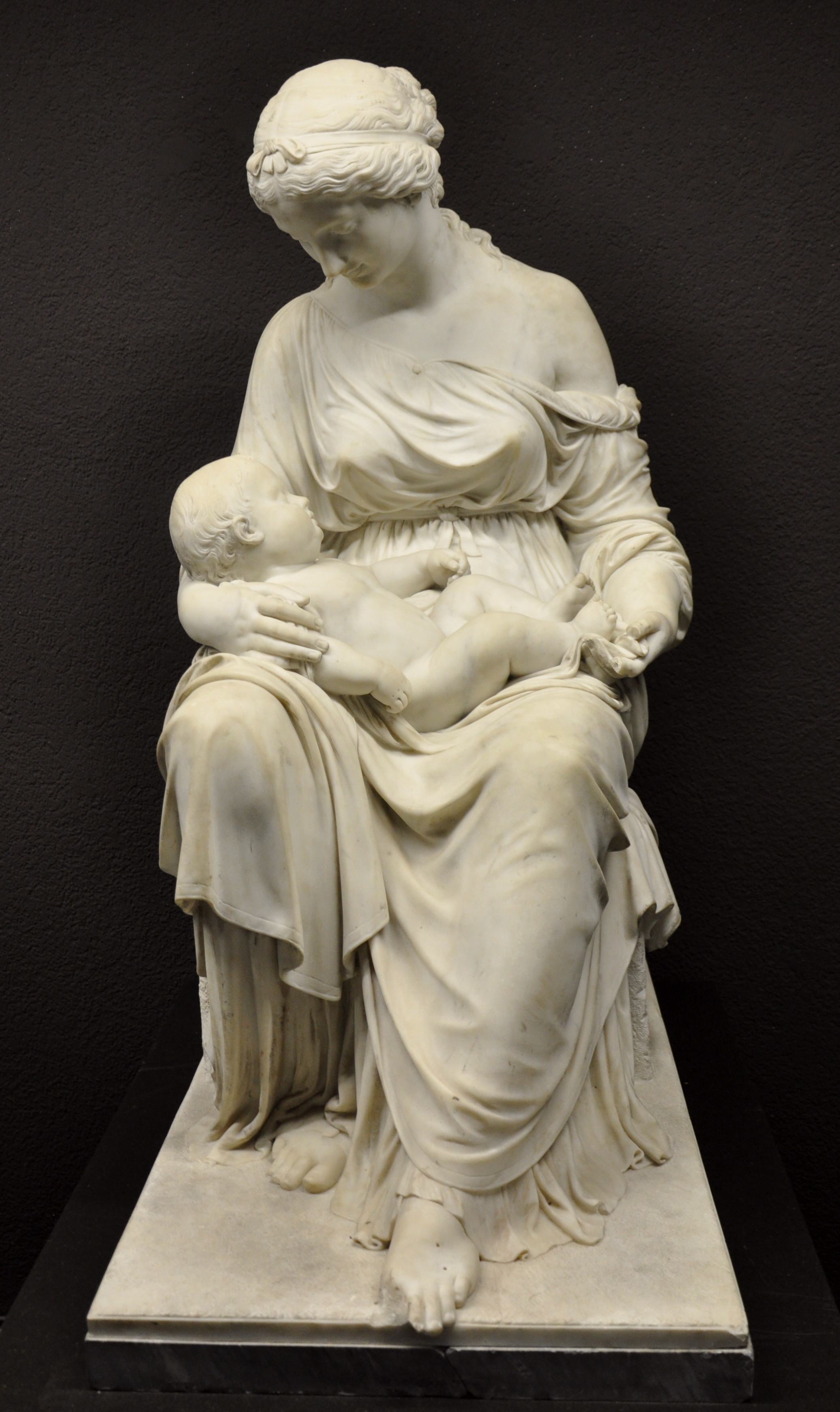 Gustav Kaupert: Junge Frau mit Kind im Schoß, Marmor; Rom, 1856 Liebieghaus, Frankfurt am Main, Inv. Nr. St.P. 282 (ausgestellt im Schaudepot)